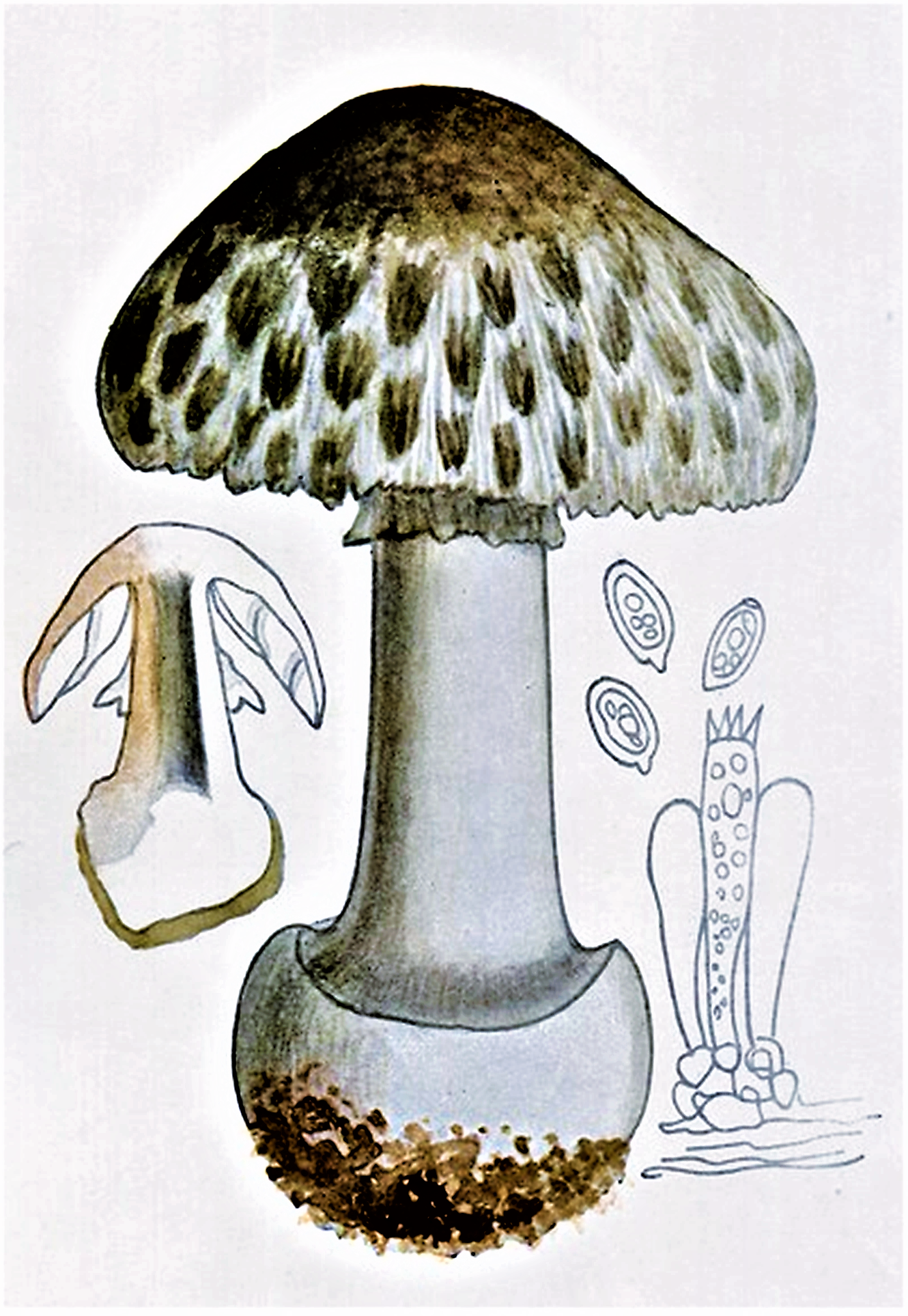 Giacomo Bresadola: Lepiota rhacodes, Syn. Macrolepiota rhacodes, heute Chlorophyllum rhacodes